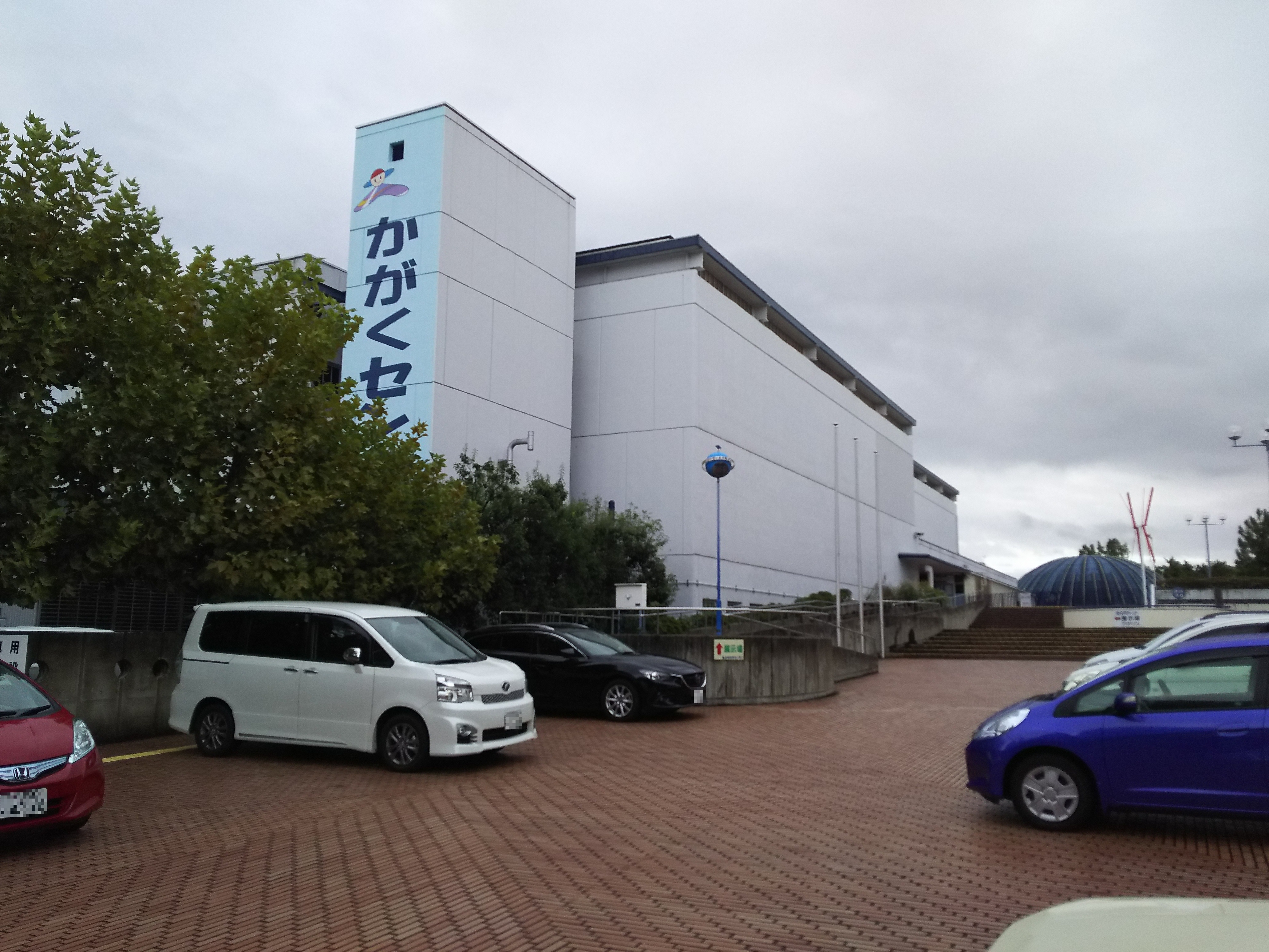 京都市青少年科学センター（京都市伏見区）